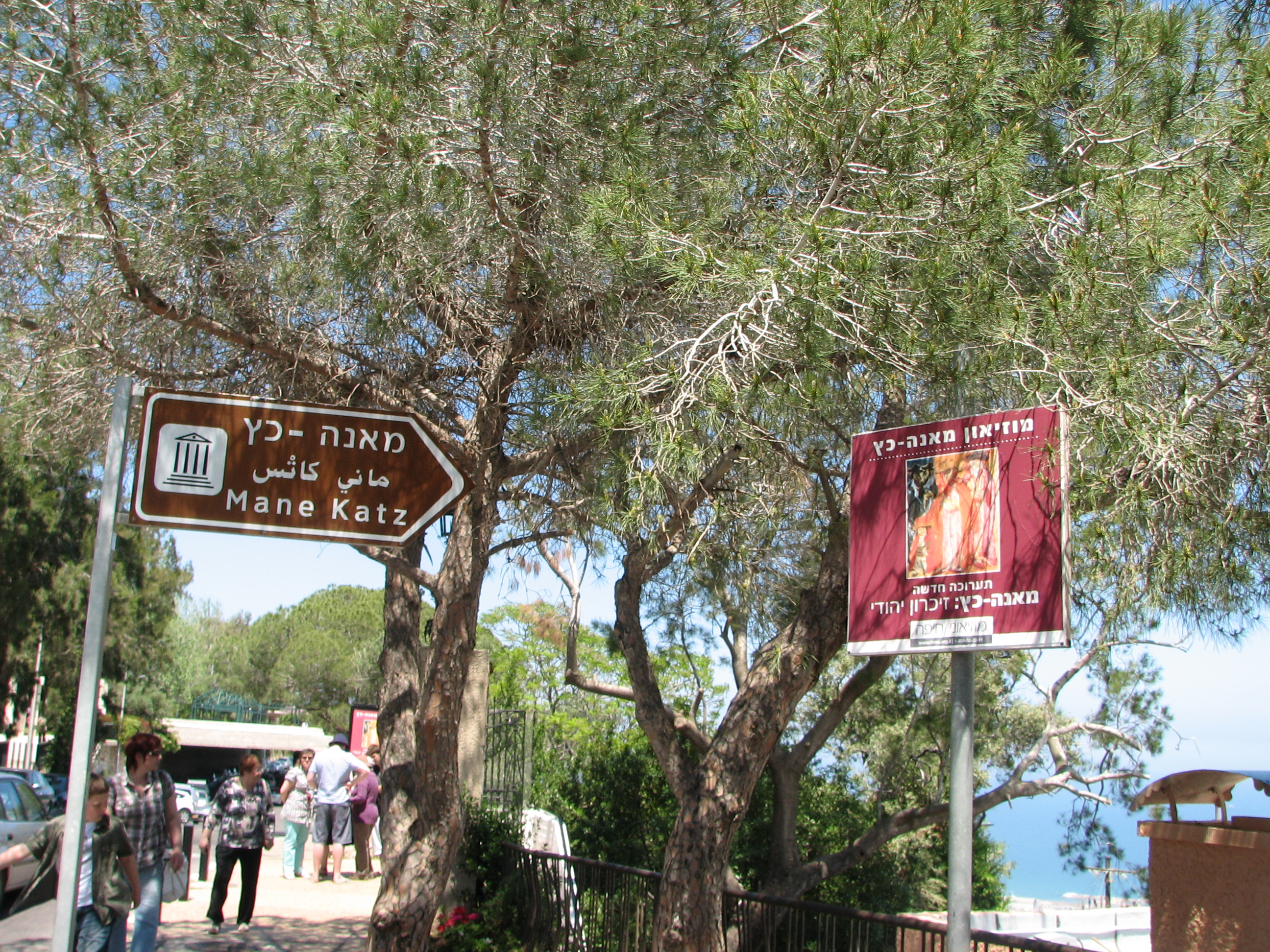 Mane Catz Museum , Haifa Israel Emmanuel Mané-Katz was a Jewish painterת best known for his depictions of the Jewish shtetl in Eastern Europe מוזיאון מאנה כץ הוא מוזיאון לאמנות בעיר חיפה, המוקדש ליצירתו של הצייר מאנה כץ. המוזיאון נמצא במרכז הכרמל ברחוב יפה נוף שלט הכניסה למוזיאון ברחוב יפה נוף, מול מרכז פנורמה